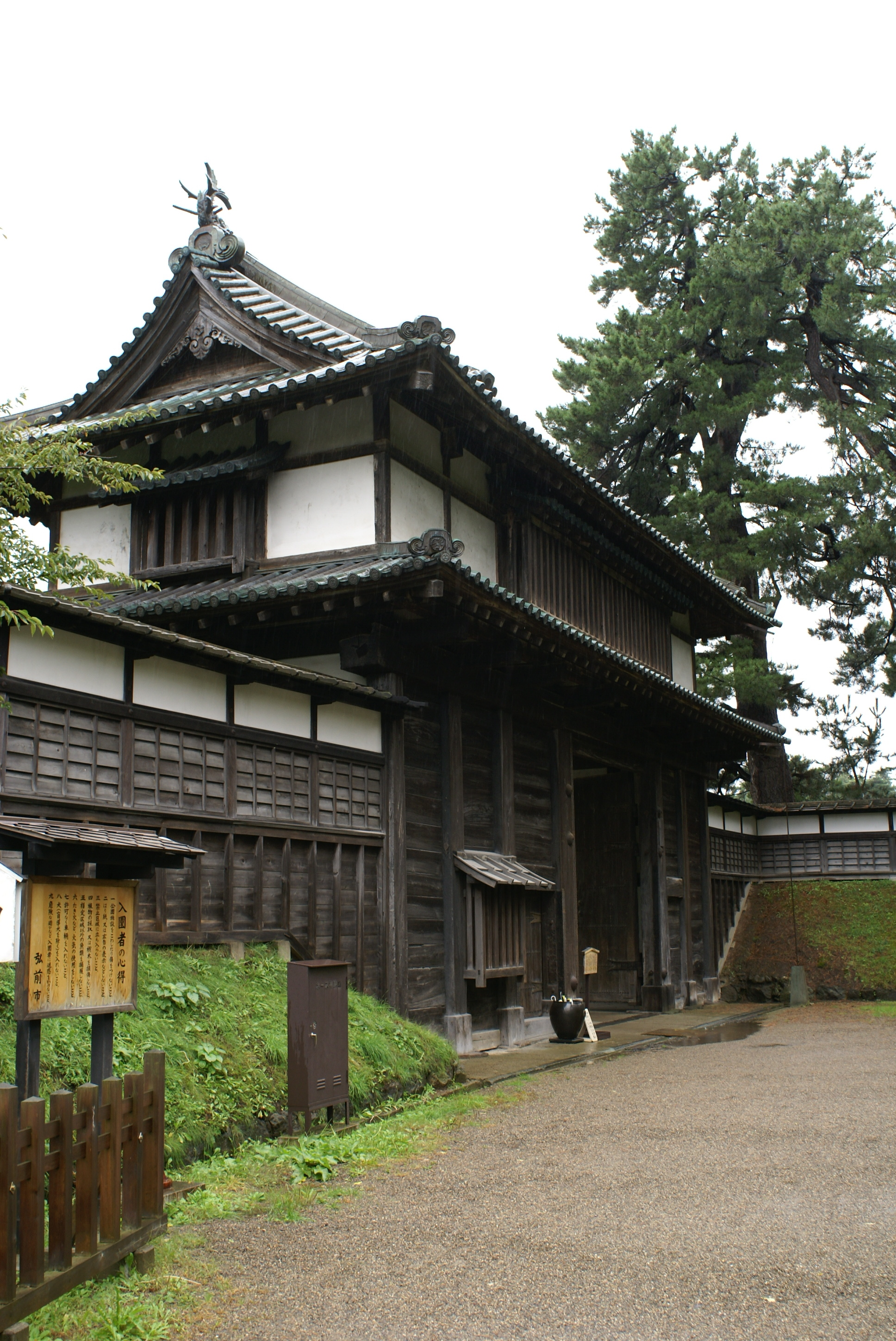 弘前城北門